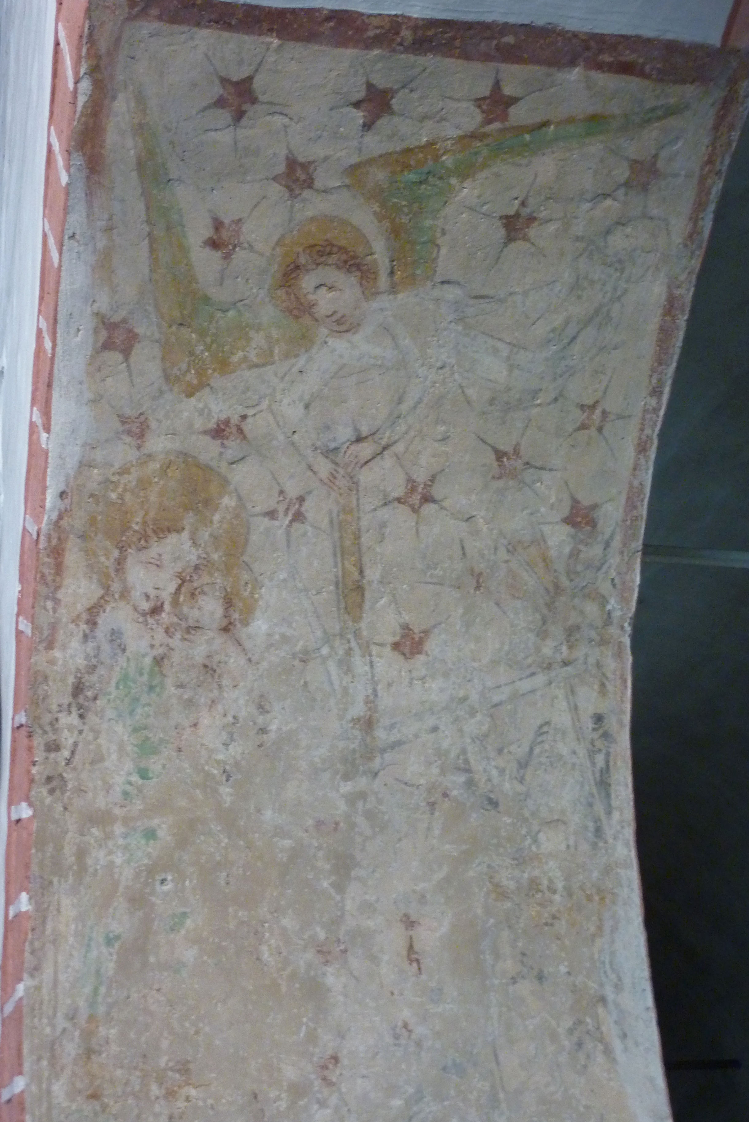 Alte katholische Pfarrkirche St. Peter und Paul in Odendorf, einem Ortsteil von Swisttal im Rhein-Sieg-Kreis (Nordrhein-Westfalen), Wandmalerei aus dem 15. Jahrhundert